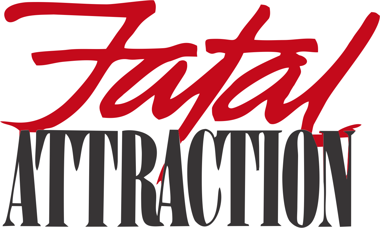 Logotipo de la cinta "Fatal Attraction" de 1987.